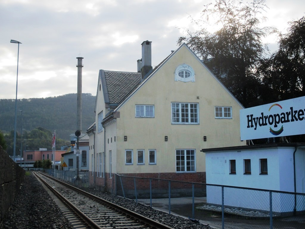 Notodden gamle stasjon. Arkitekt: Thorvald Astrup.